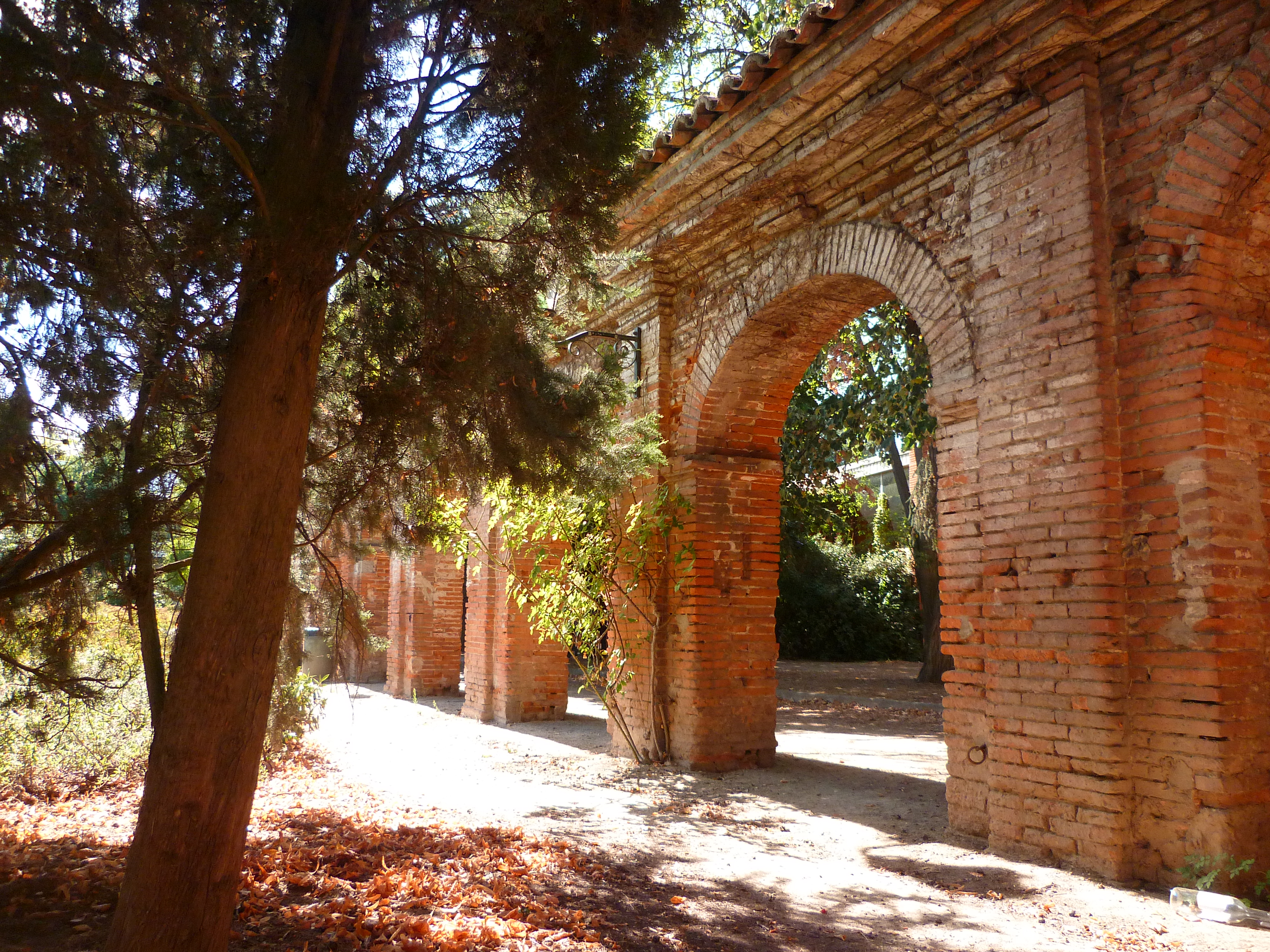 Toulouse (Haute-Garonne, France) : Détail de l'ancien cloître des Chartreux à la fac de droit.